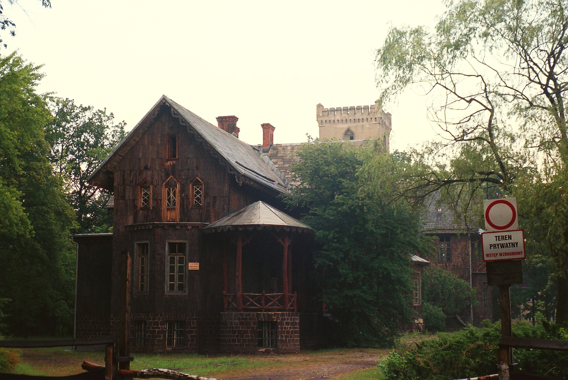 Moja Wola, zespół pałacowy, 1 poł. XIX, XX